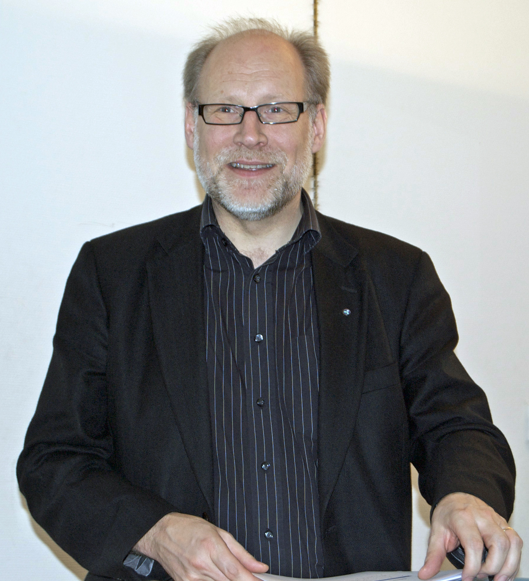 Stefan Attefall - Gruppledare för KD i Riksdagen